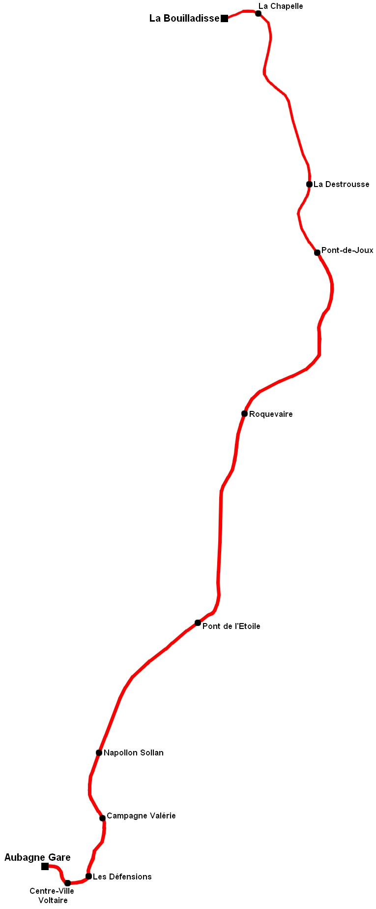 Tracé géographique de la ligne Val'tram d'Aubagne